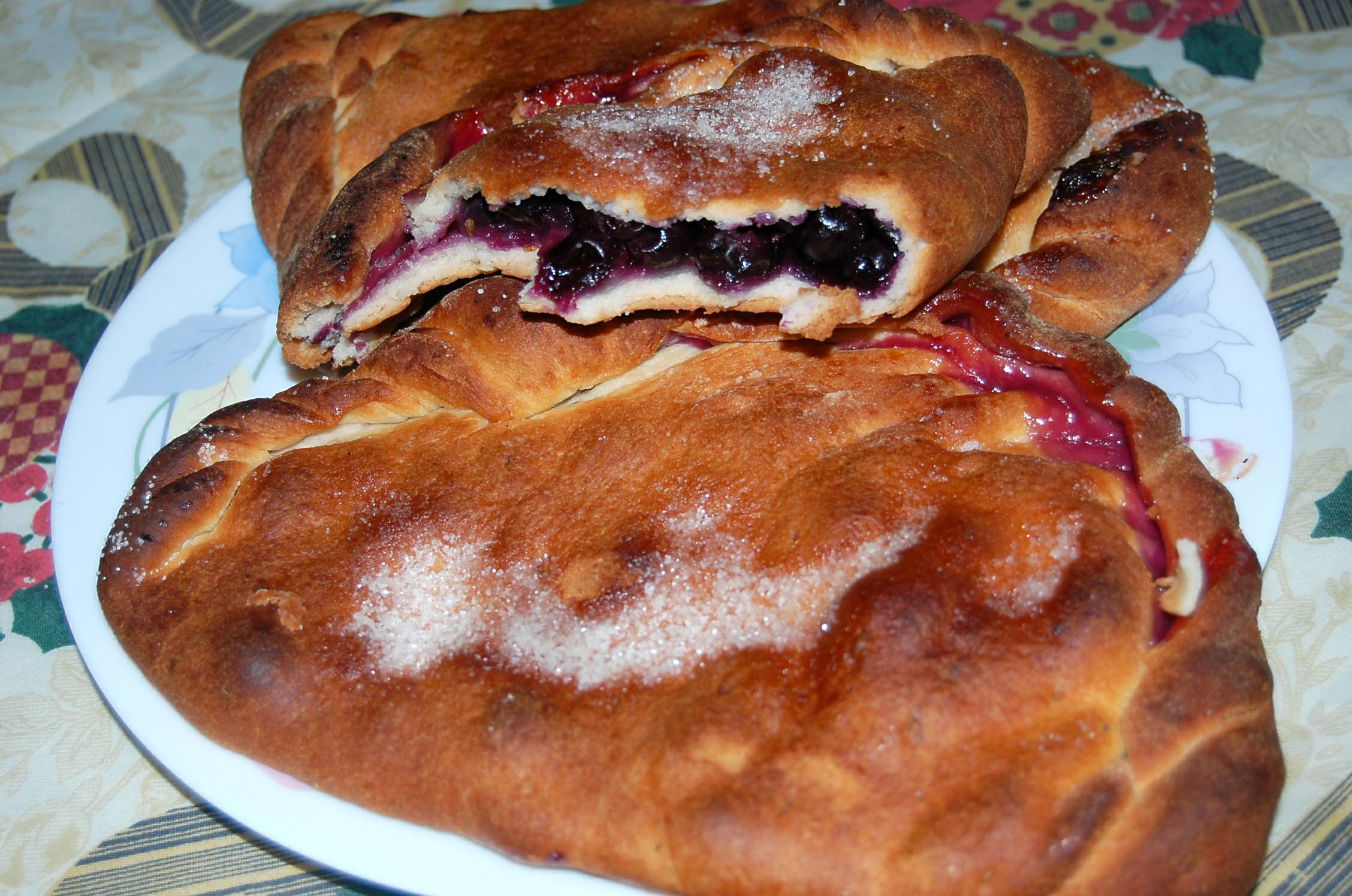 Foto de unas Harinosas